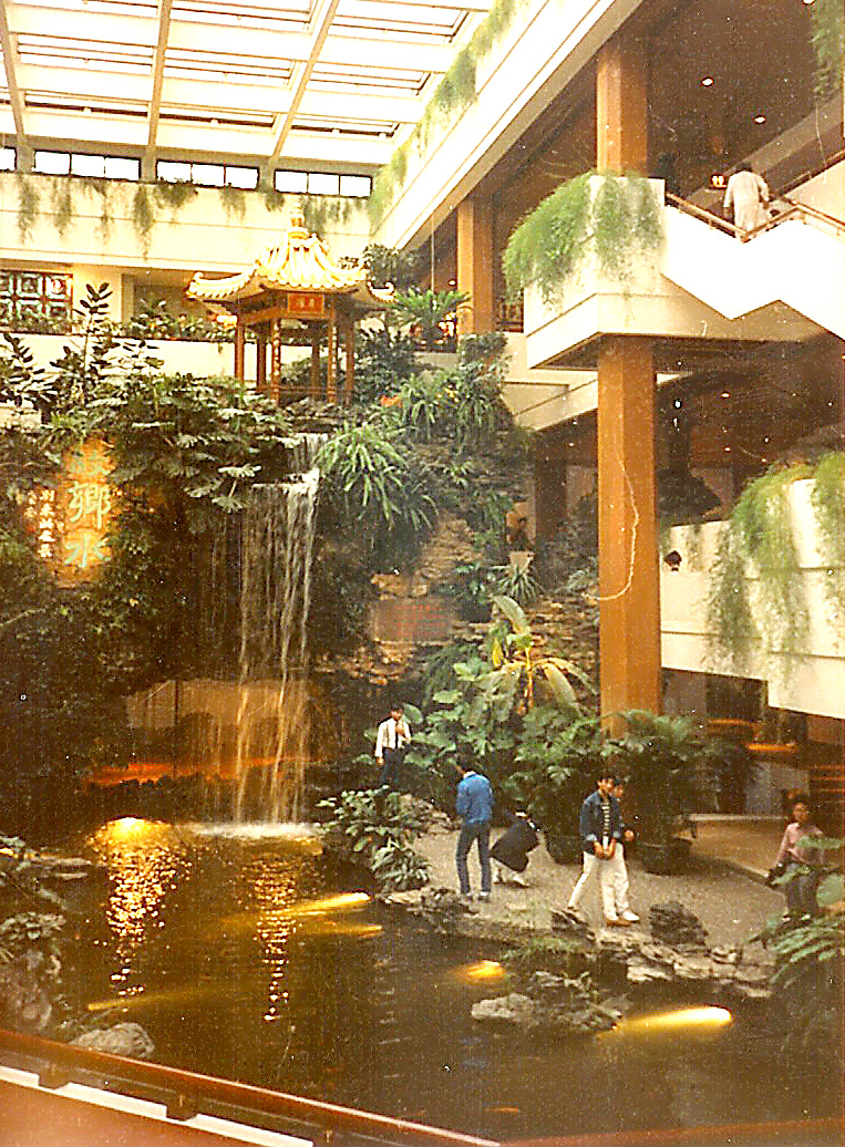 E Luxushotel zu Gunangzhou